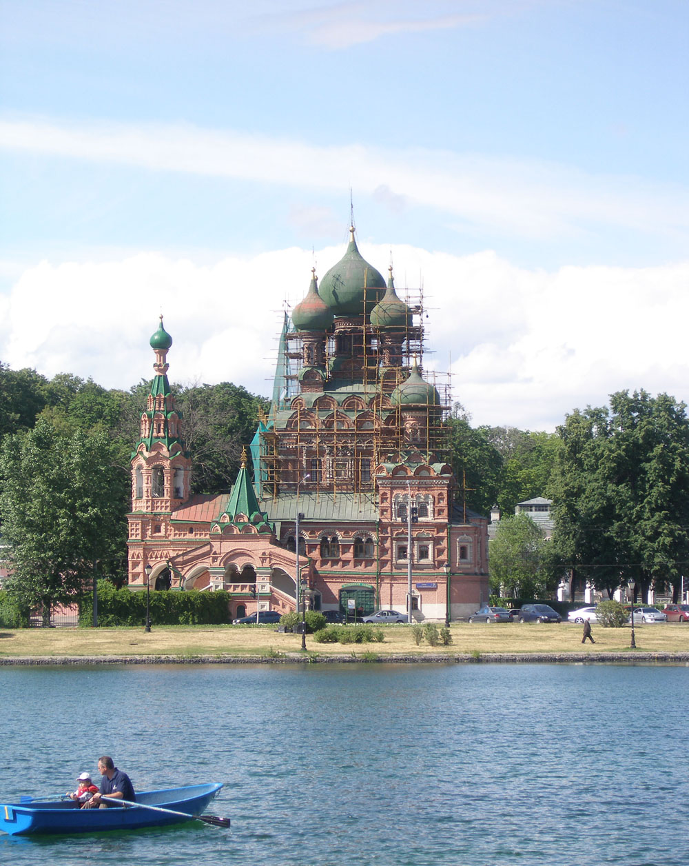 Церковь Троицы в Останкино/Trinity Church in Ostankino